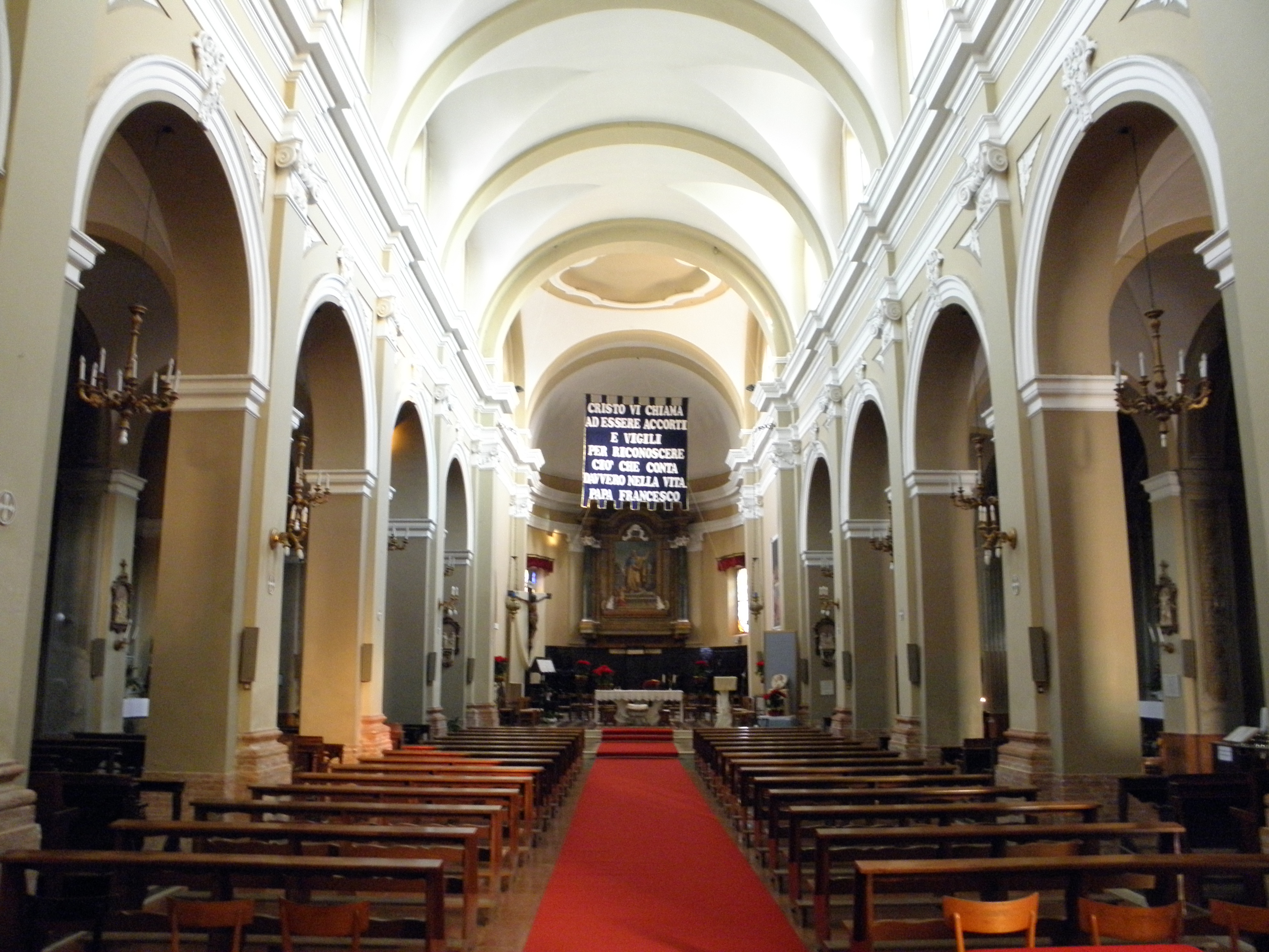 Massa Fiscaglia, già comune autonomo e ora frazione del comune di Fiscaglia: interno della chiesa dei Santi Pietro e Giacomo.